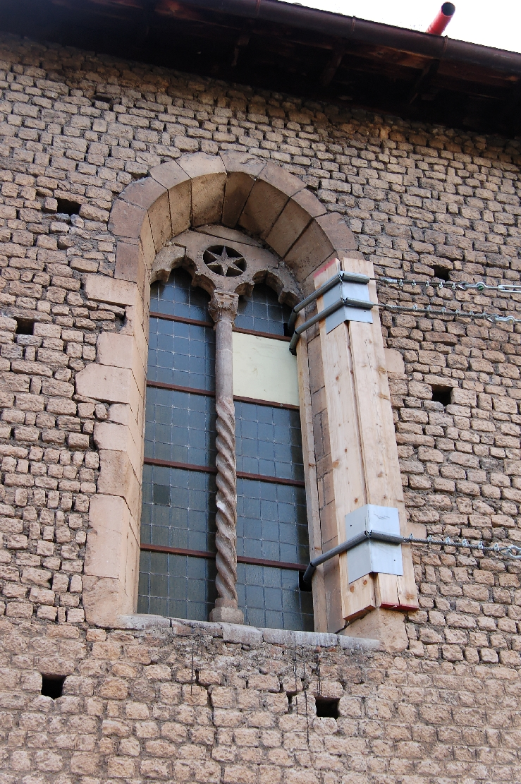 L'Aquila 2011